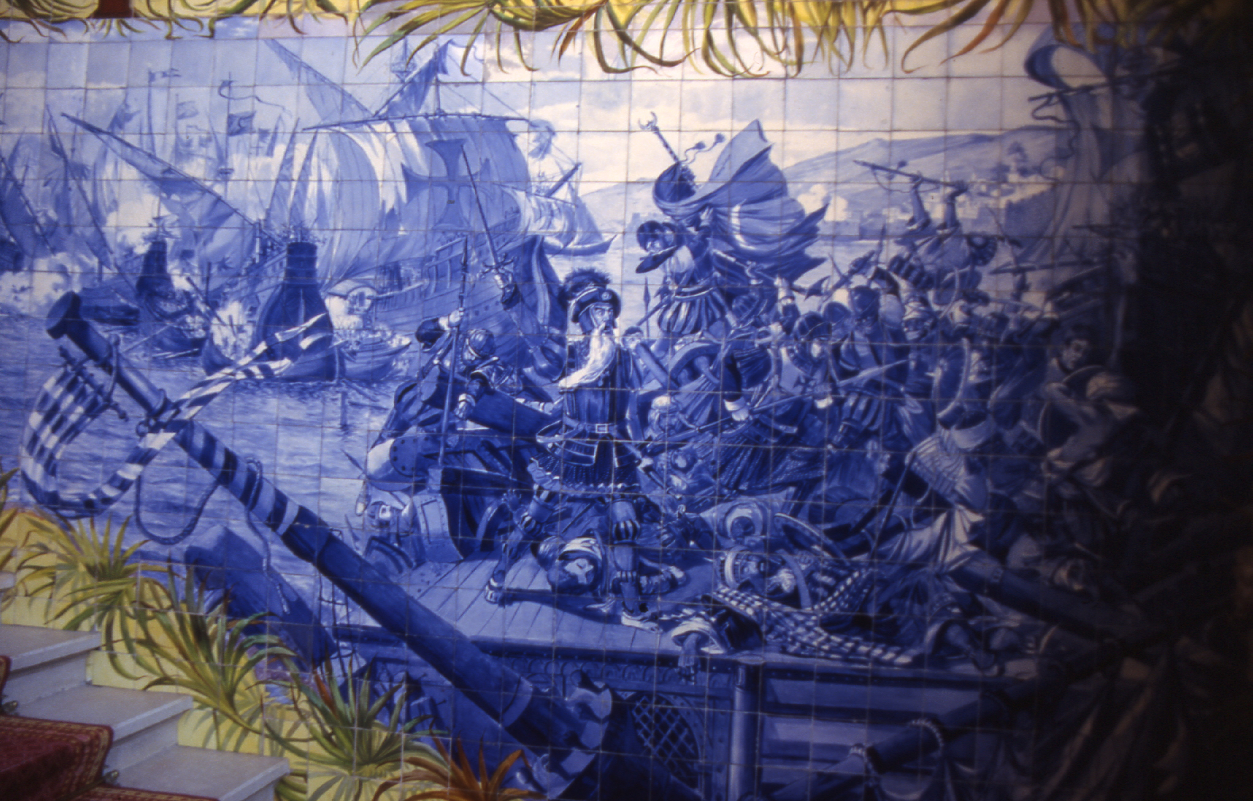 AzulejoPalácioHoteldoBuçaco2